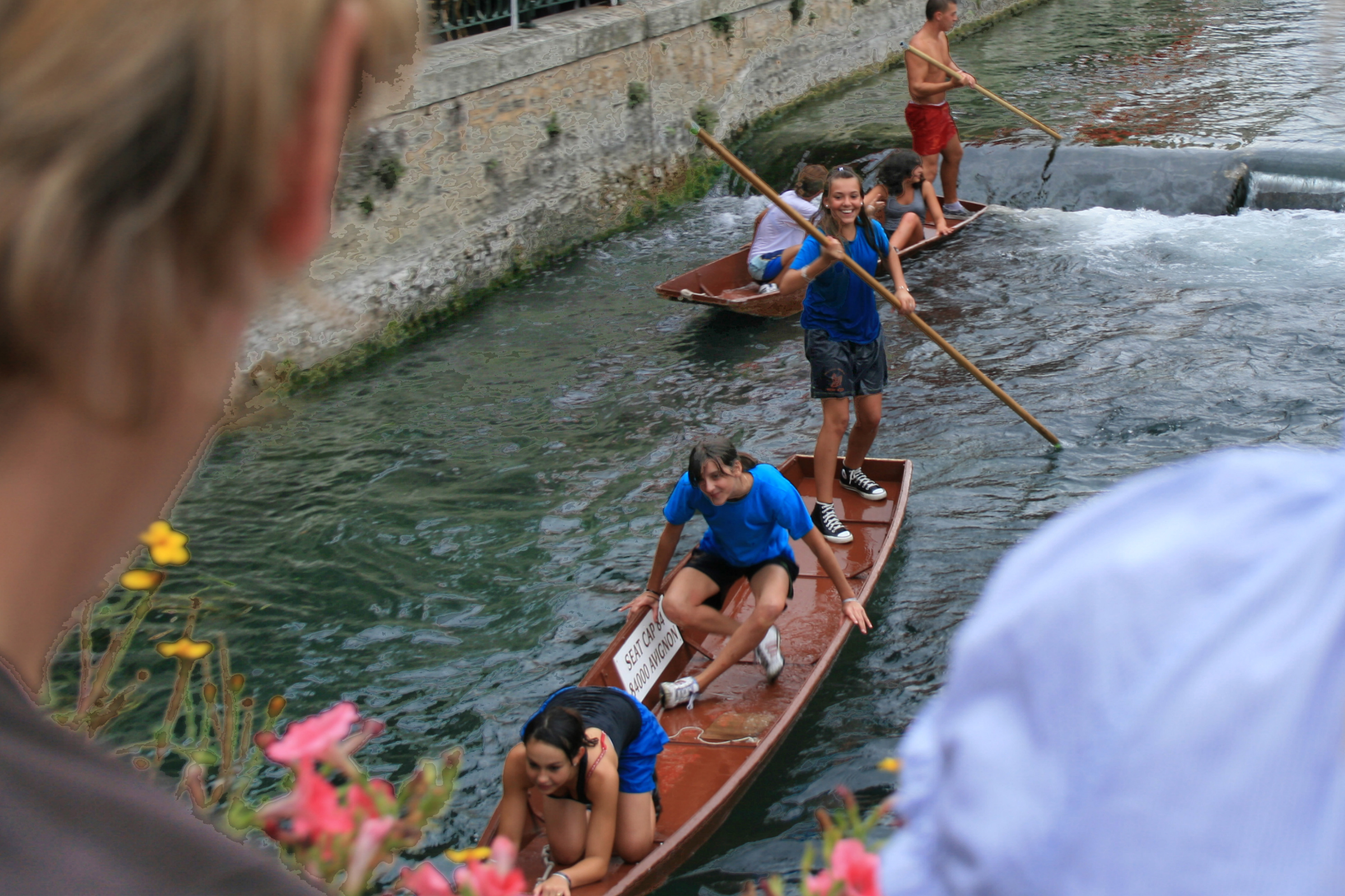 L'Isle-sur-la-Sorgue. Nego-chin : barque à fond plat